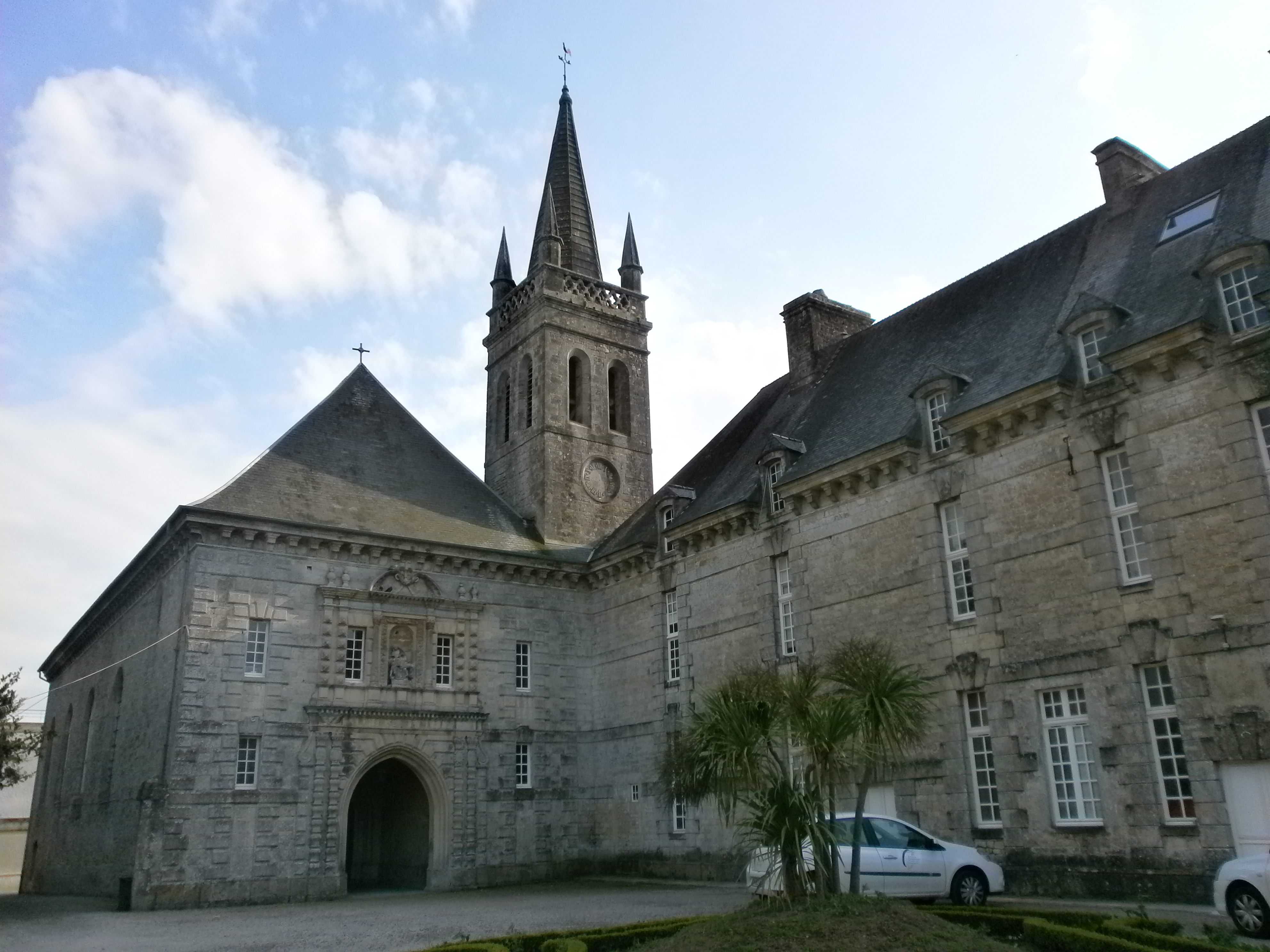 Valognes, hôpital de Valognes, ancienne abbaye bénédictine : chapelle.